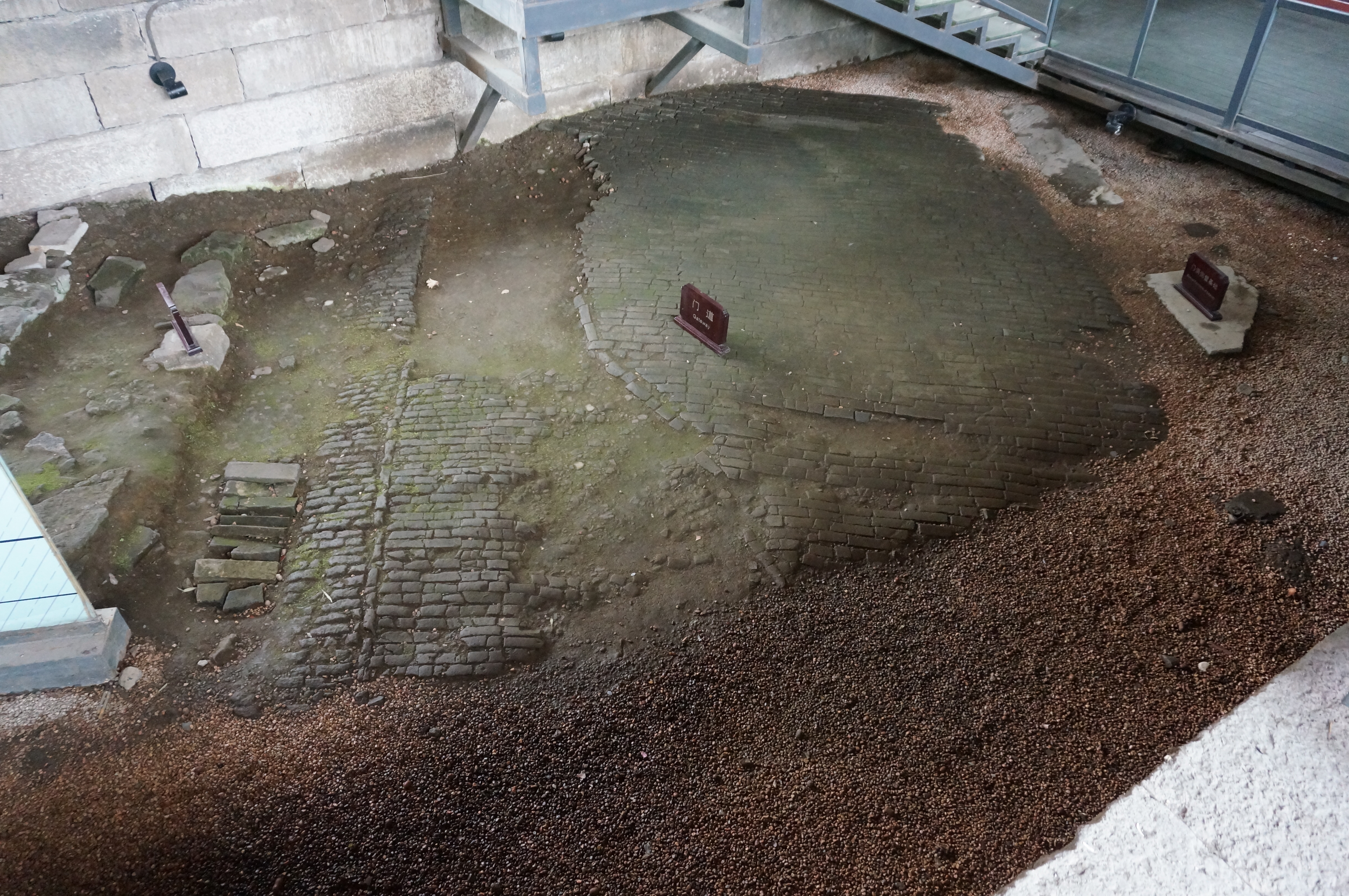 杭州钱塘门遗址，门道正面。